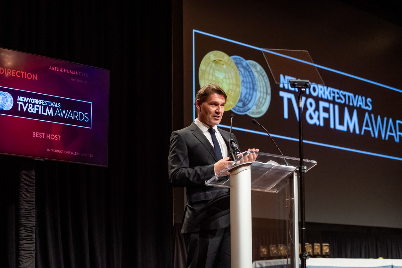 Jeremy JP Fekete erhält den Gold Medal Award für seine arte Reihe" BAHNHOFSKATHEDRALEN - EUROPAS REISEPALÄSTE"